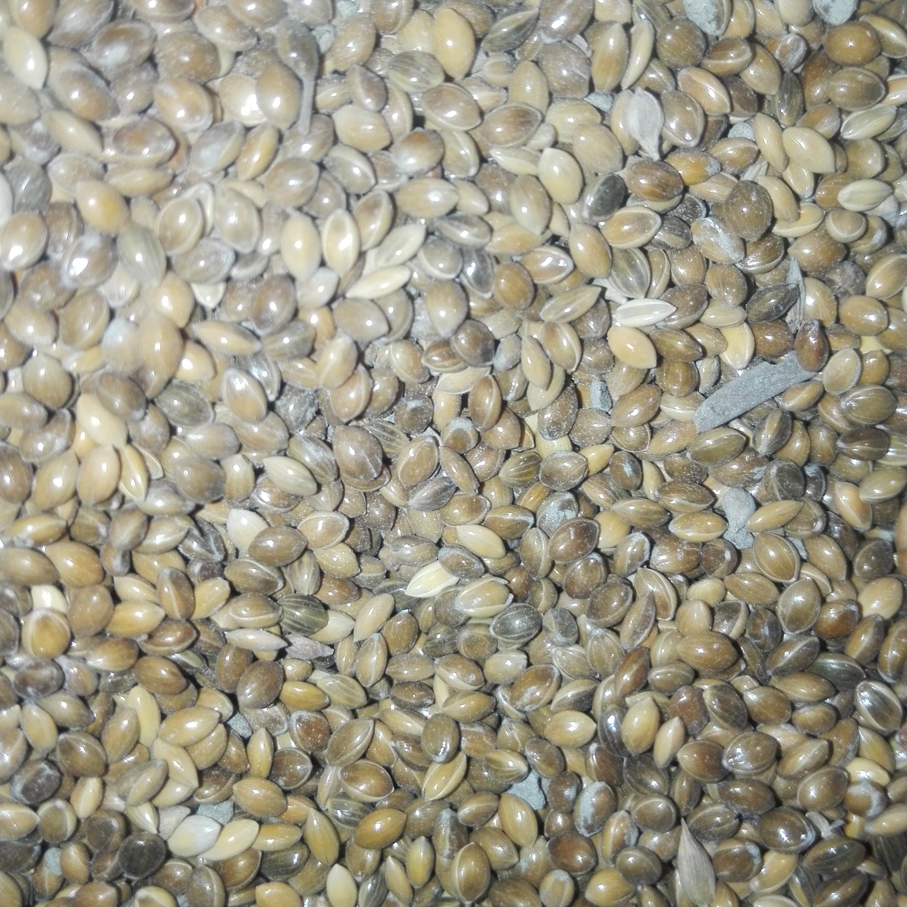 grass seed